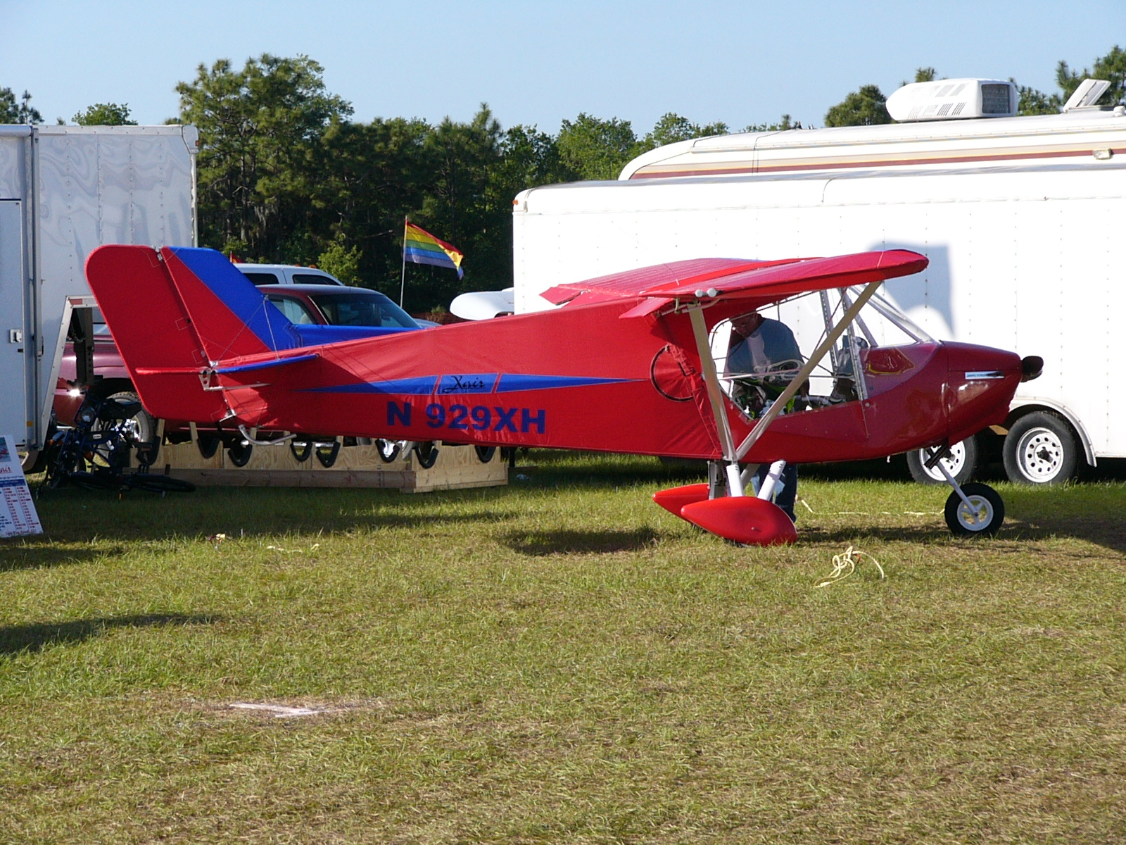 A Raj Hamsa Ultralights X-AIR H Hanuman at Sun 'n Fun 2004